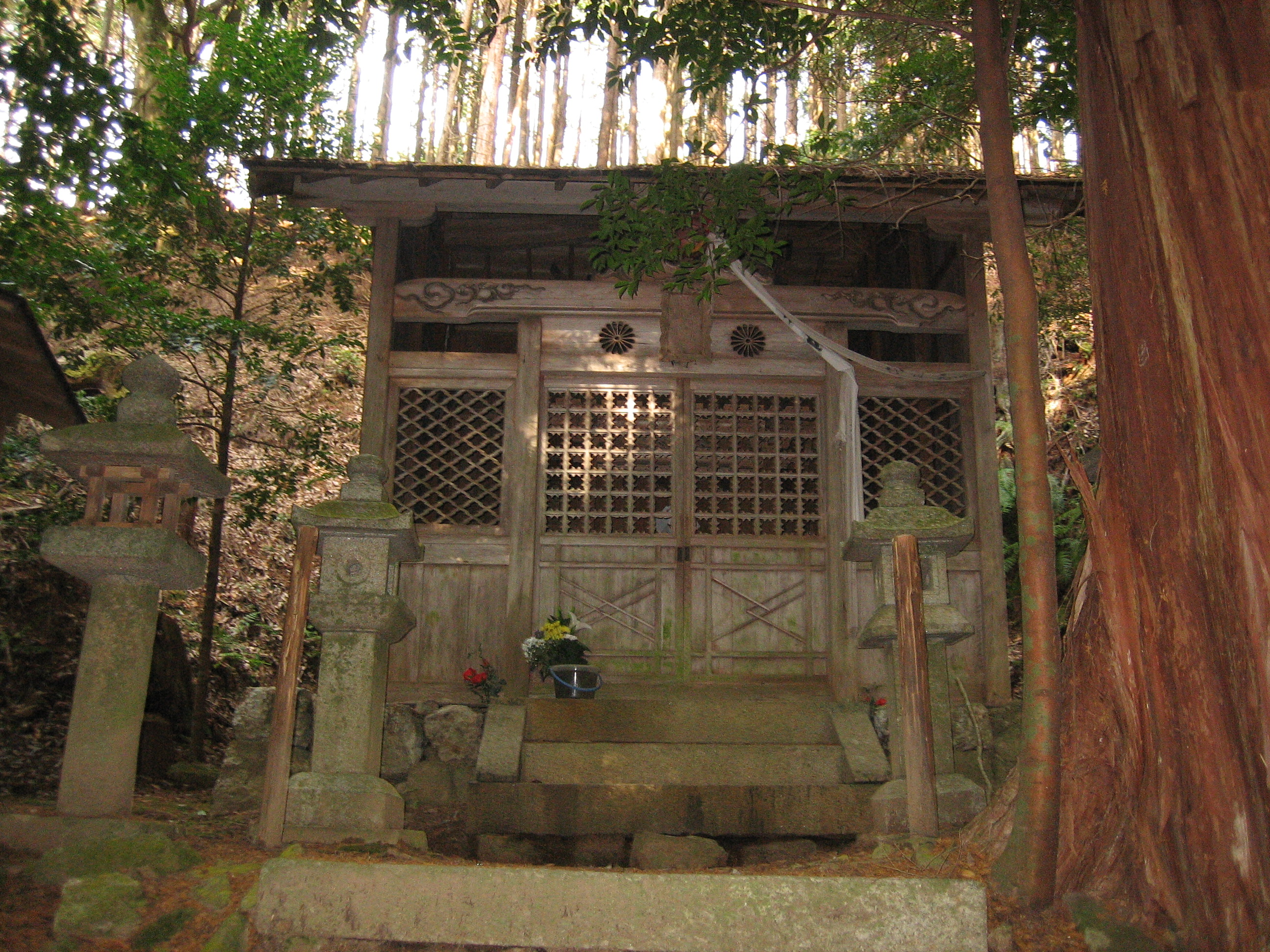 京都市北区西賀茂氷室町から氷室神社を撮影